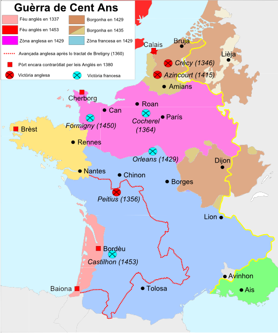 Guèrra de Cent Ans (1337-1453).